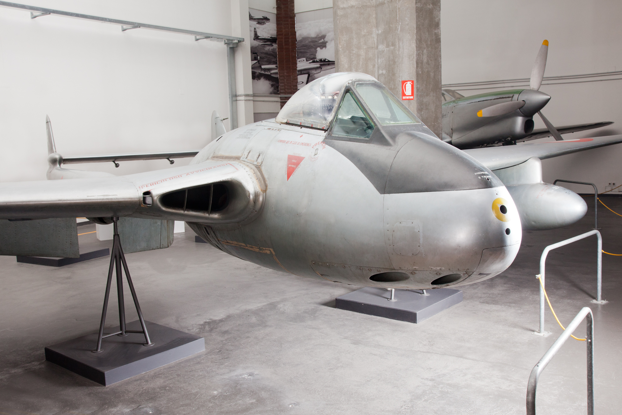 Caccia monomotore Macchi DH 100 Vampire, esposto al Museo nazionale della scienza e della tecnologia Leonardo da Vinci di Milano.